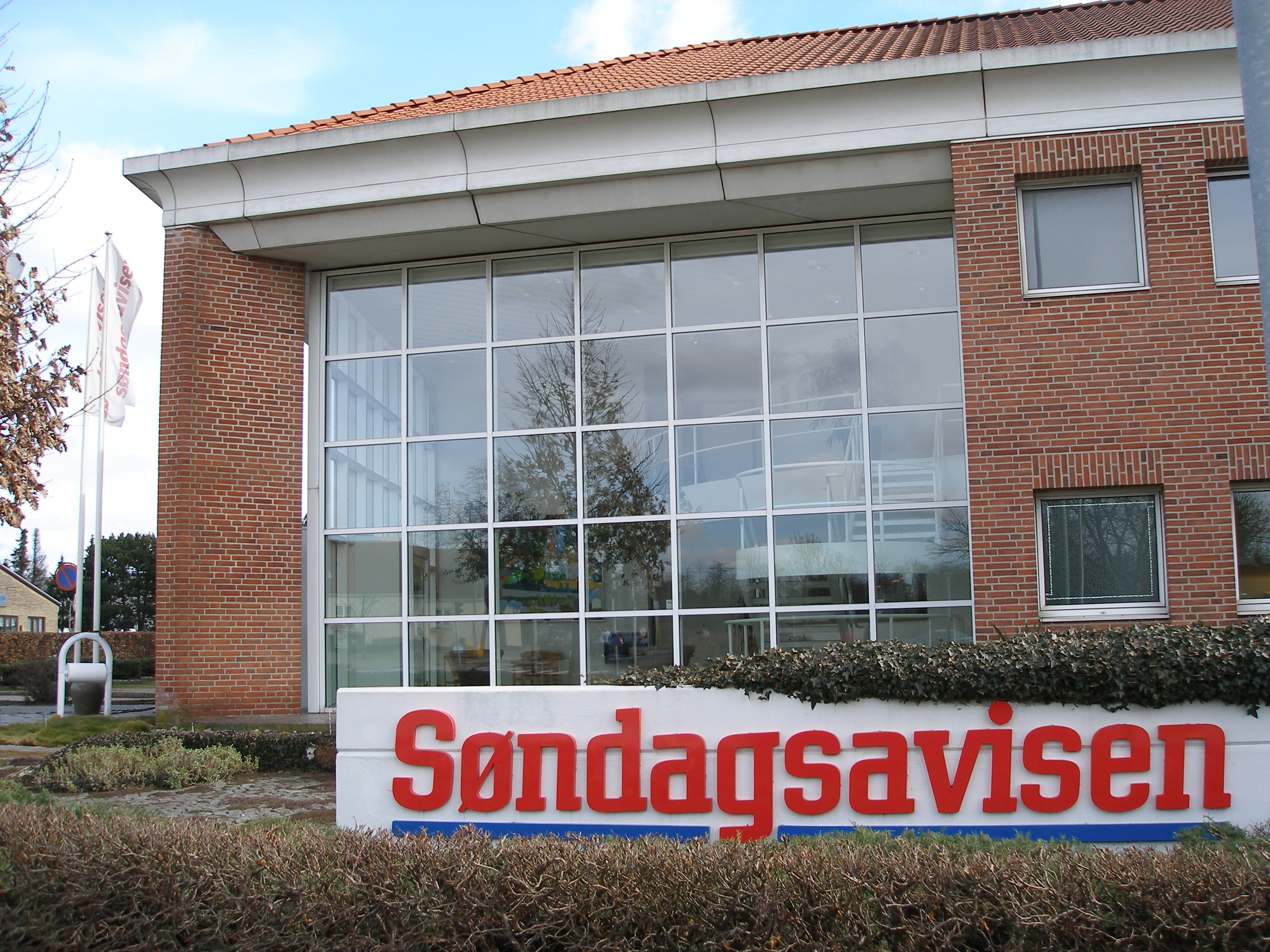 Søndagsavisen hovedkontor, Gladsaxe Møllevej 28, Søborg